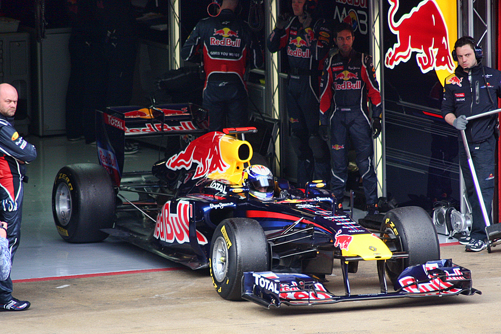 F1 Test Days. Circuit de Catalunya